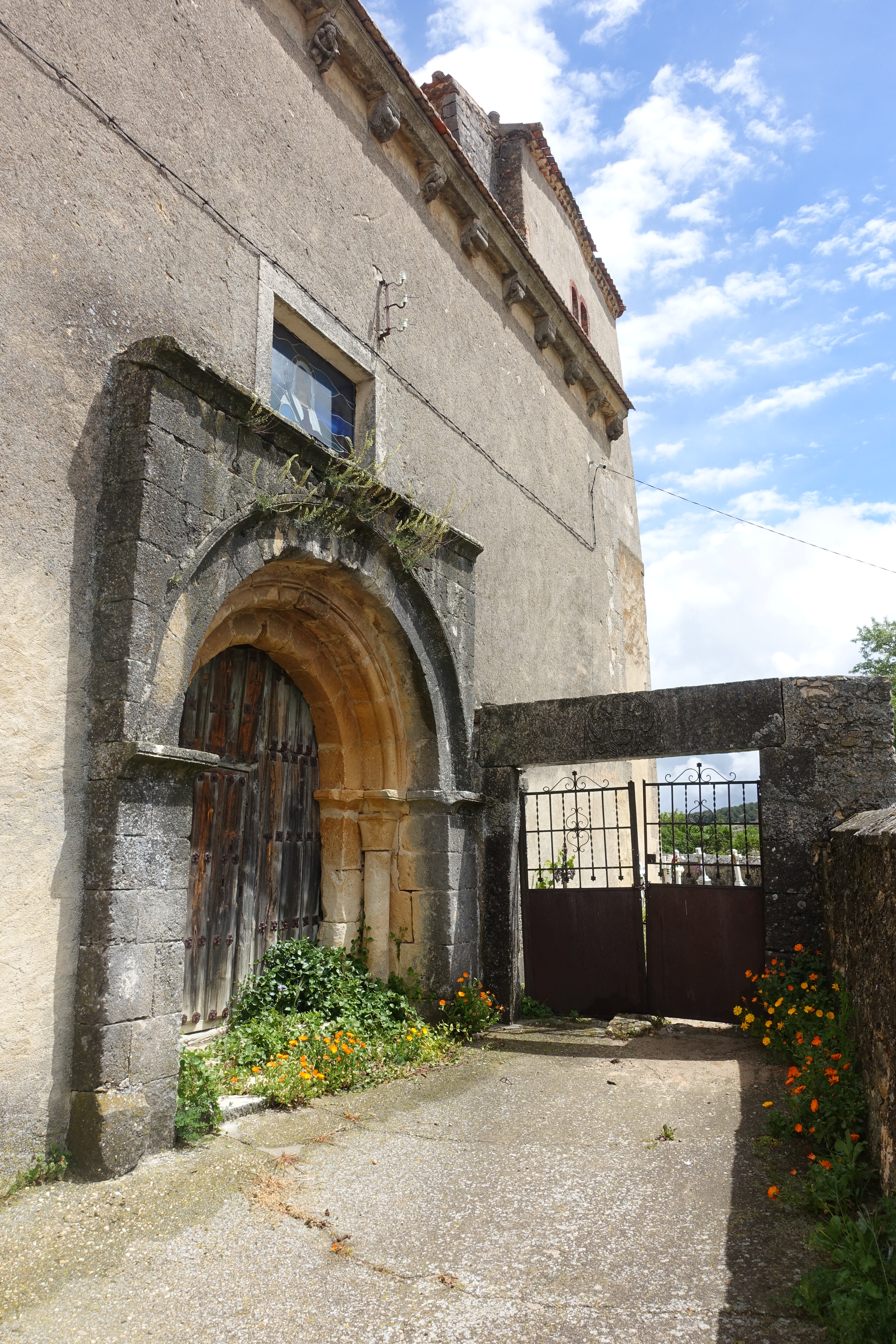 Iglesia de la Concepción en Castro de Fuentidueña (Segovia, España).